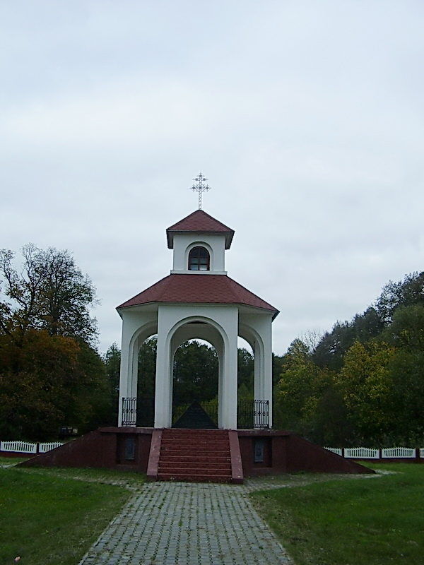 Чыжэўшчына. Царква